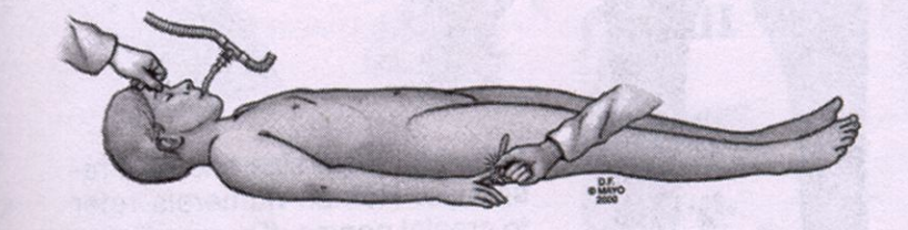 Paciente em estado de coma profundo sem nehuma resposta motora ao estimúlo intenso doloroso de preferência na face